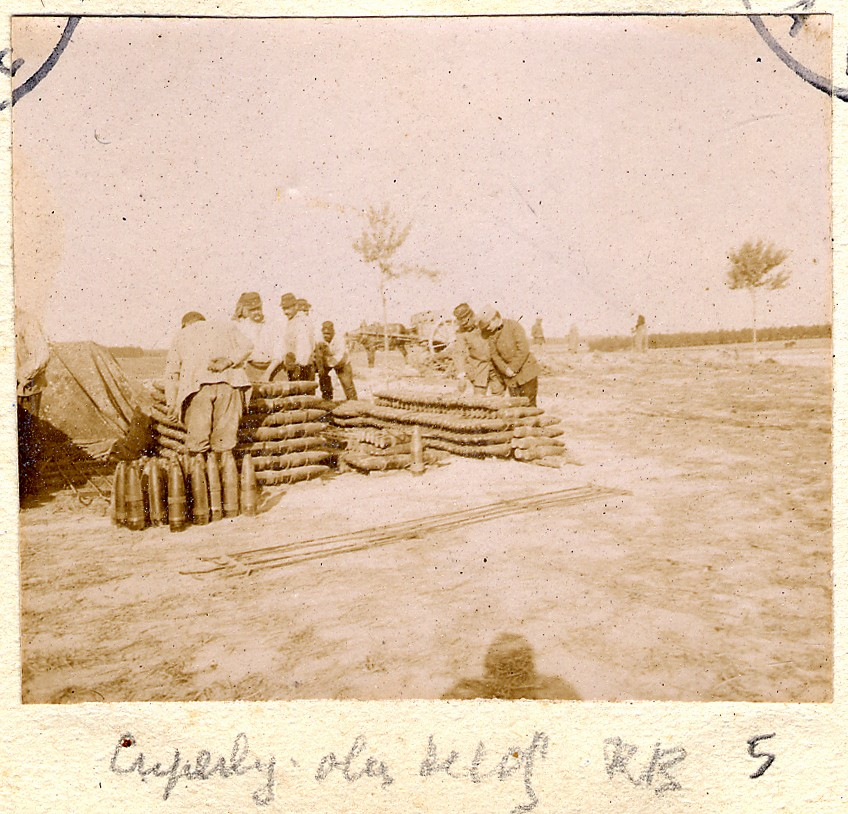 Obus de calibre 105 dans un dépôt d'artillerie à Cuperly (Marne). 1916. Guerre 1914-1918.